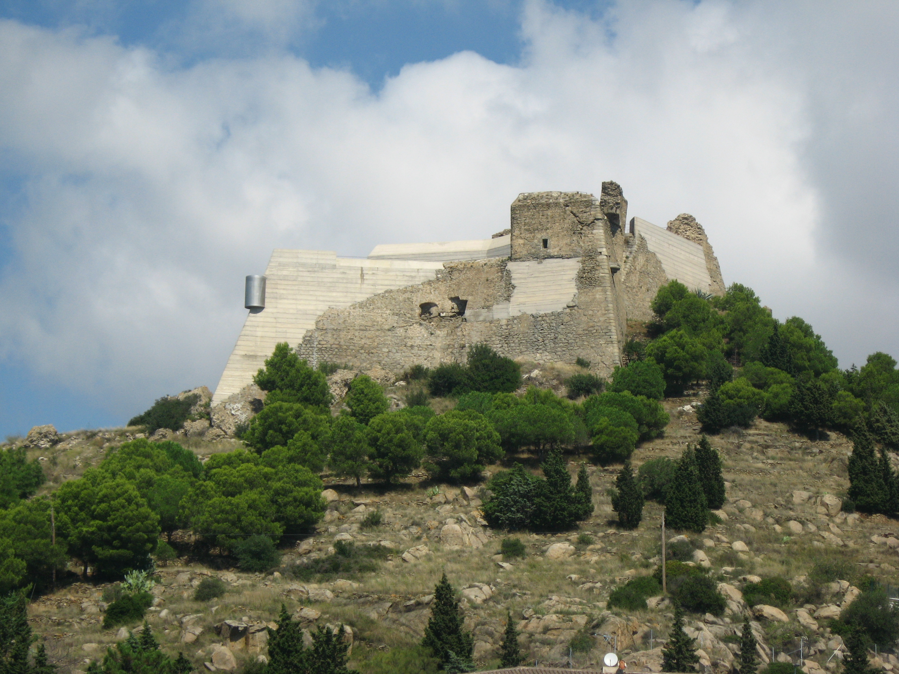 Das Castell de la Trinitat (seeseitig) Datum: 22.09.2010 Urheber: Michael Pfeiffer alias Benutzer:Gordito1869 Quelle: privates Fotoarchiv des Urhebers